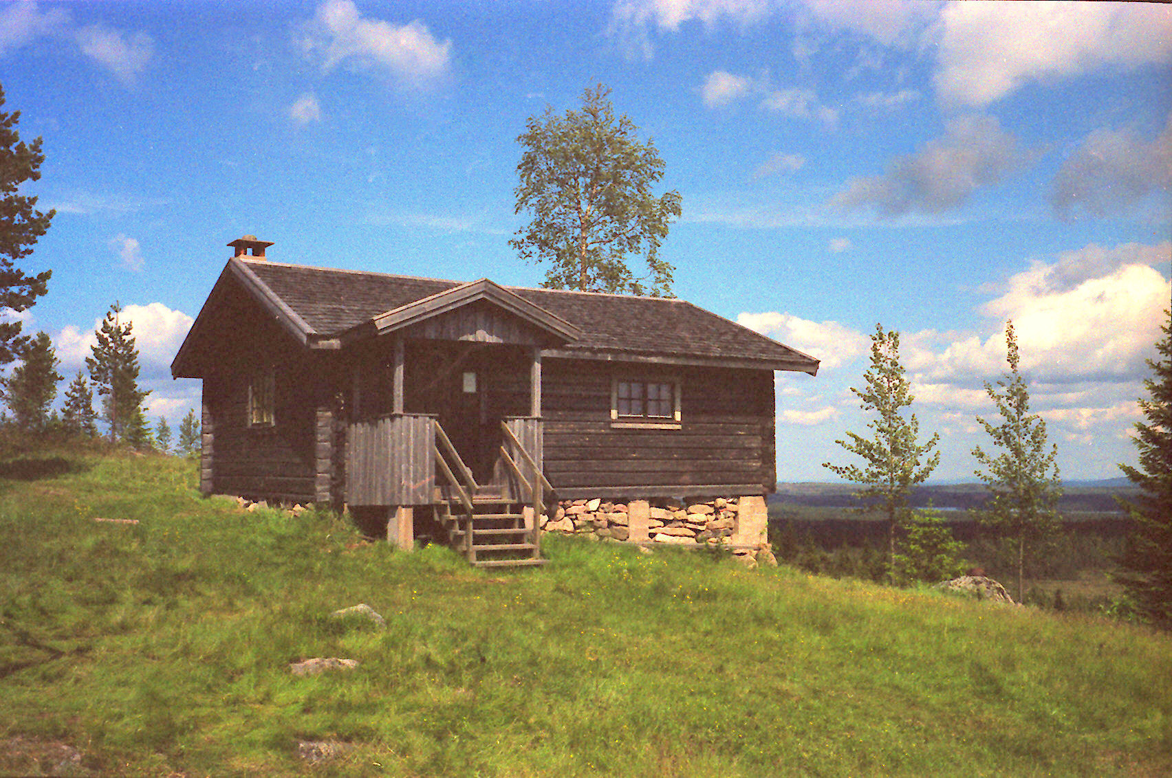 Kopia av spelmannen Lejsme Pers stuga på Rimäck i Malungs finnmark